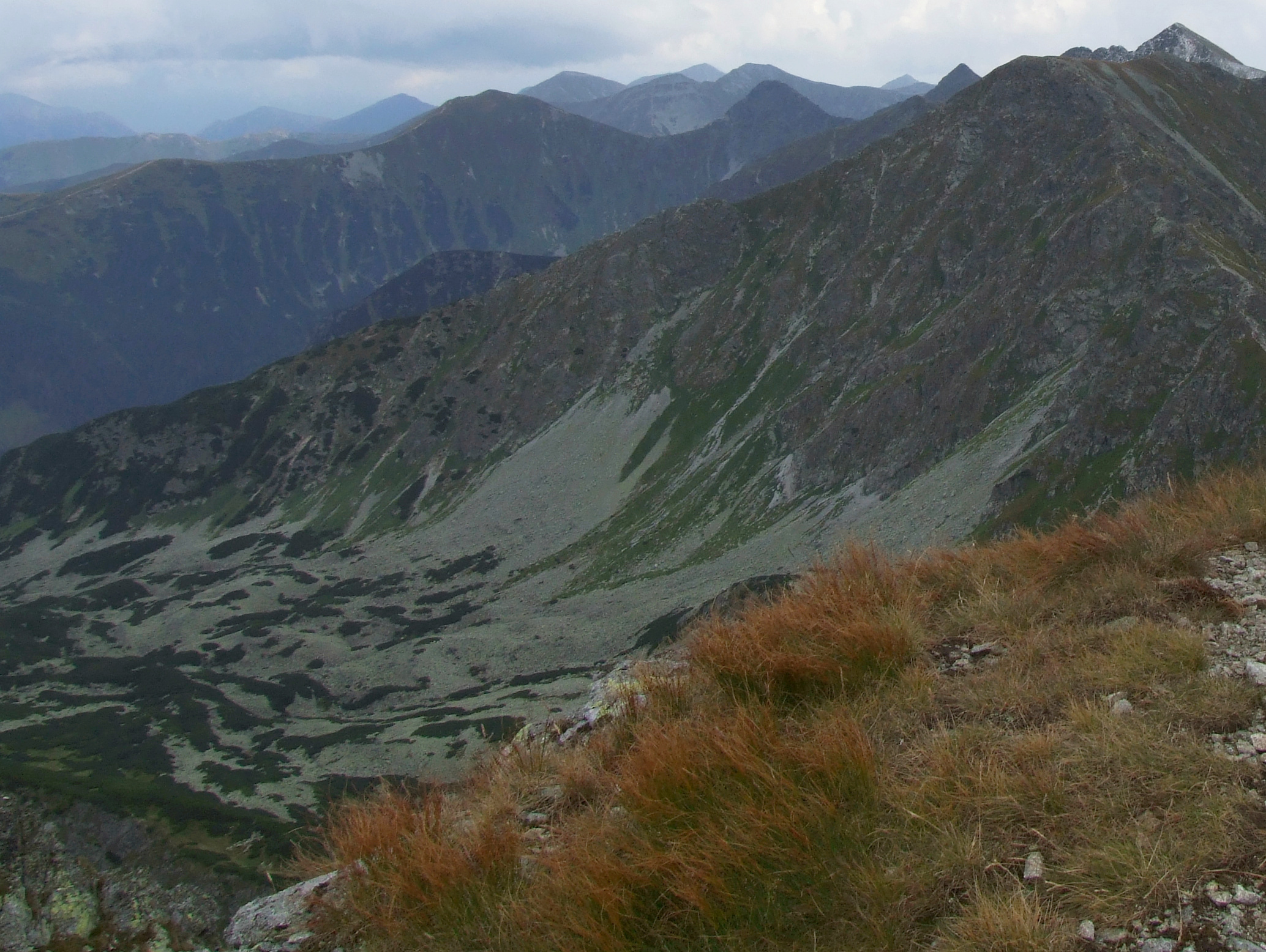 Przedna Spalona, Zadnia Salatyńska Dolina